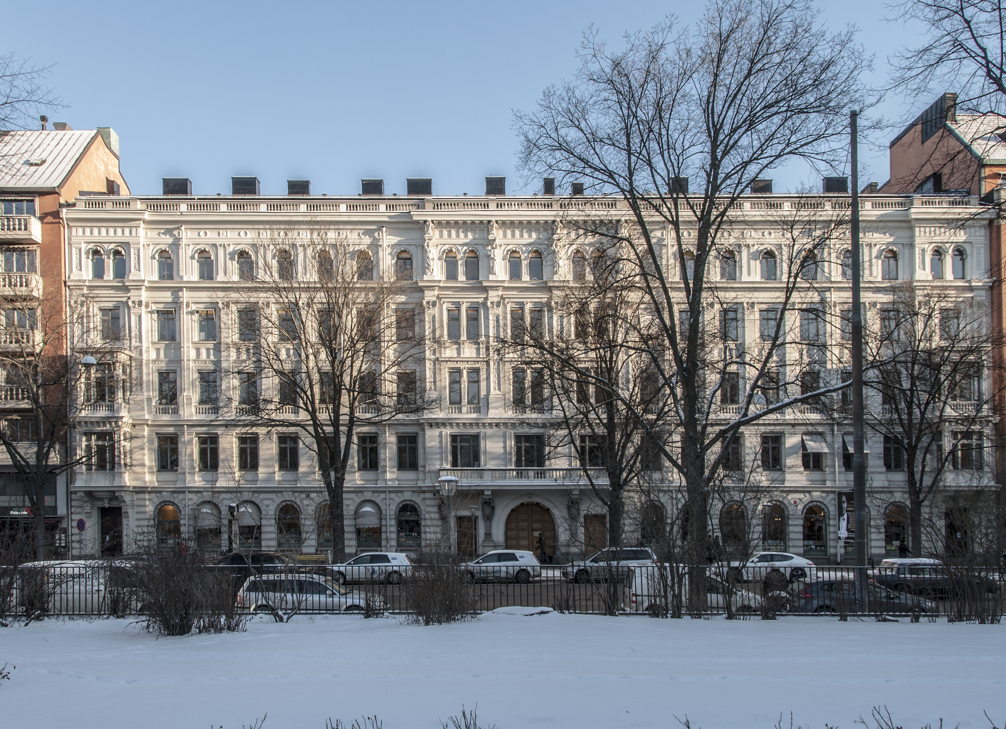 Bonnierhuset Sveavägen 54-58, Nybyggnadsår 1882 - 1884, August Reinhold (Byggherre) Fredrik Olaus Lindström (Arkitekt)